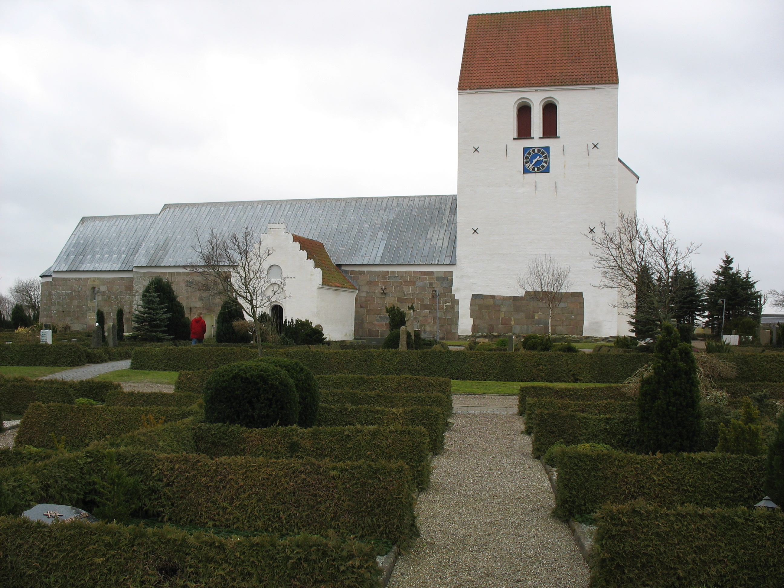 Jetsmark Kirke